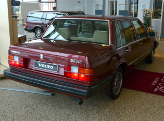 Volvo 760 GLE, Volvo Museum Arendal